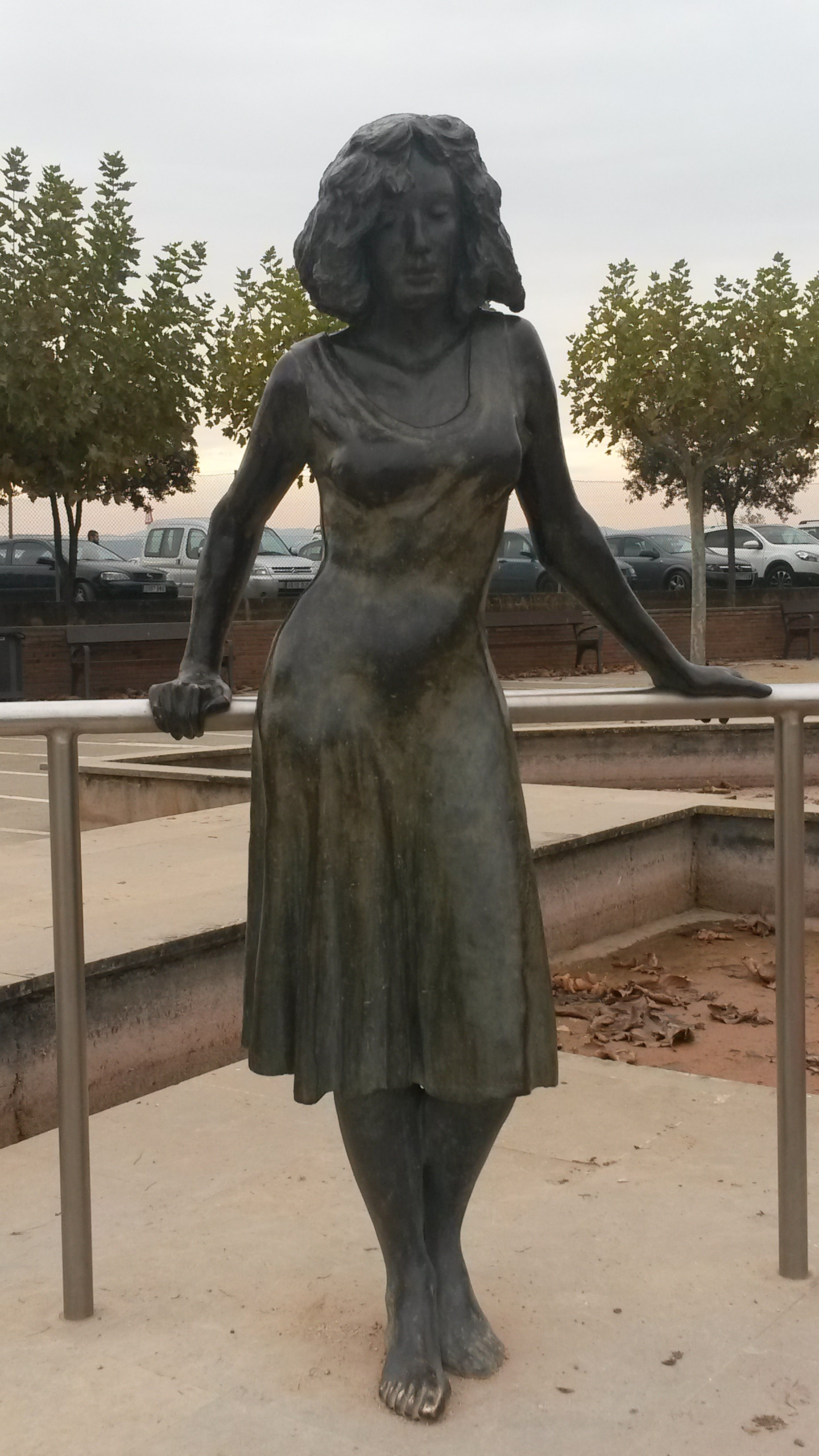 Escultura Dona d'en Ramon Oms al Parc de l'Agulla.